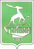 Герб Тихвина 1968 года, Ленинградская область